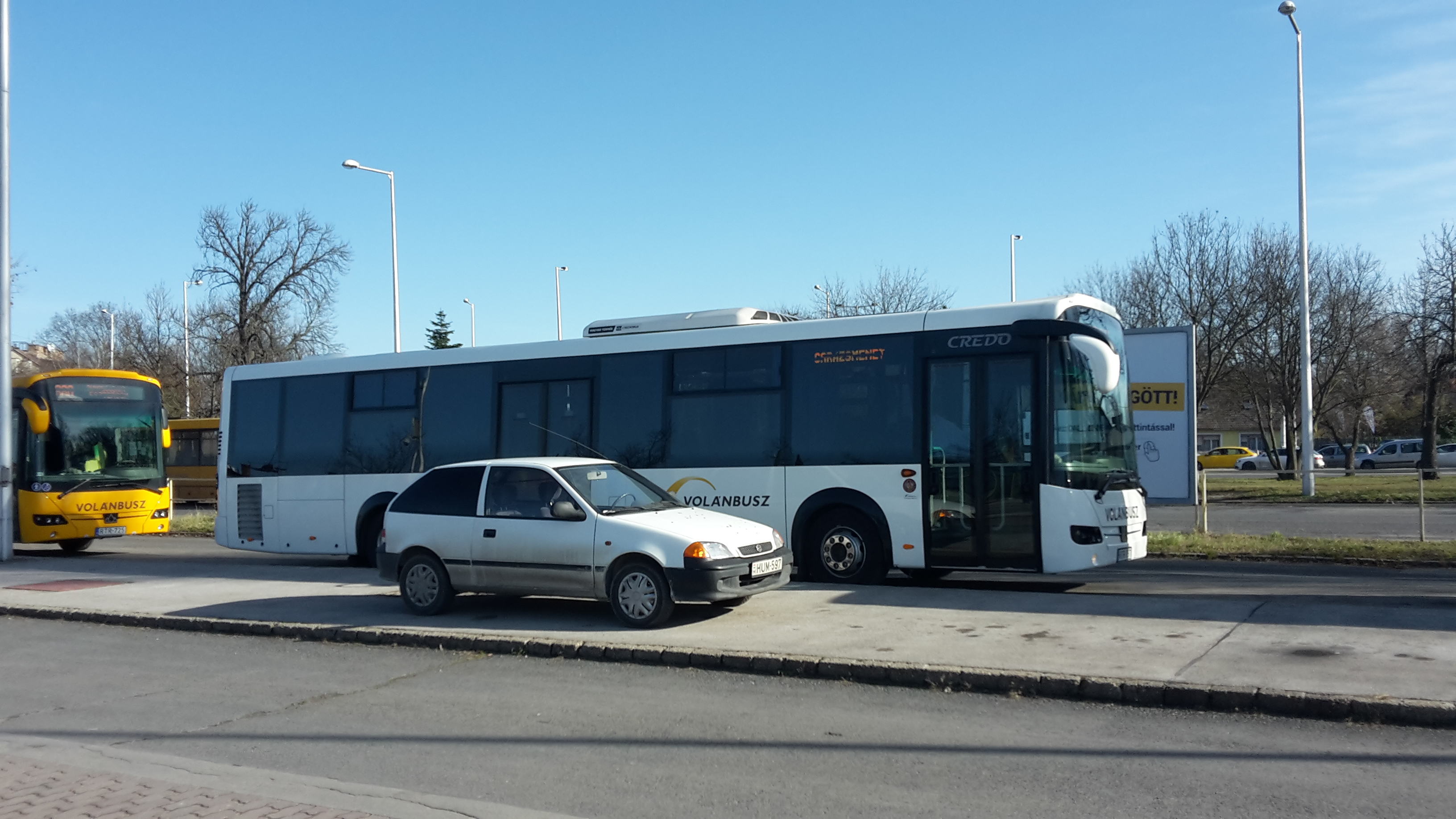 Credo Econell 12, 2020 február